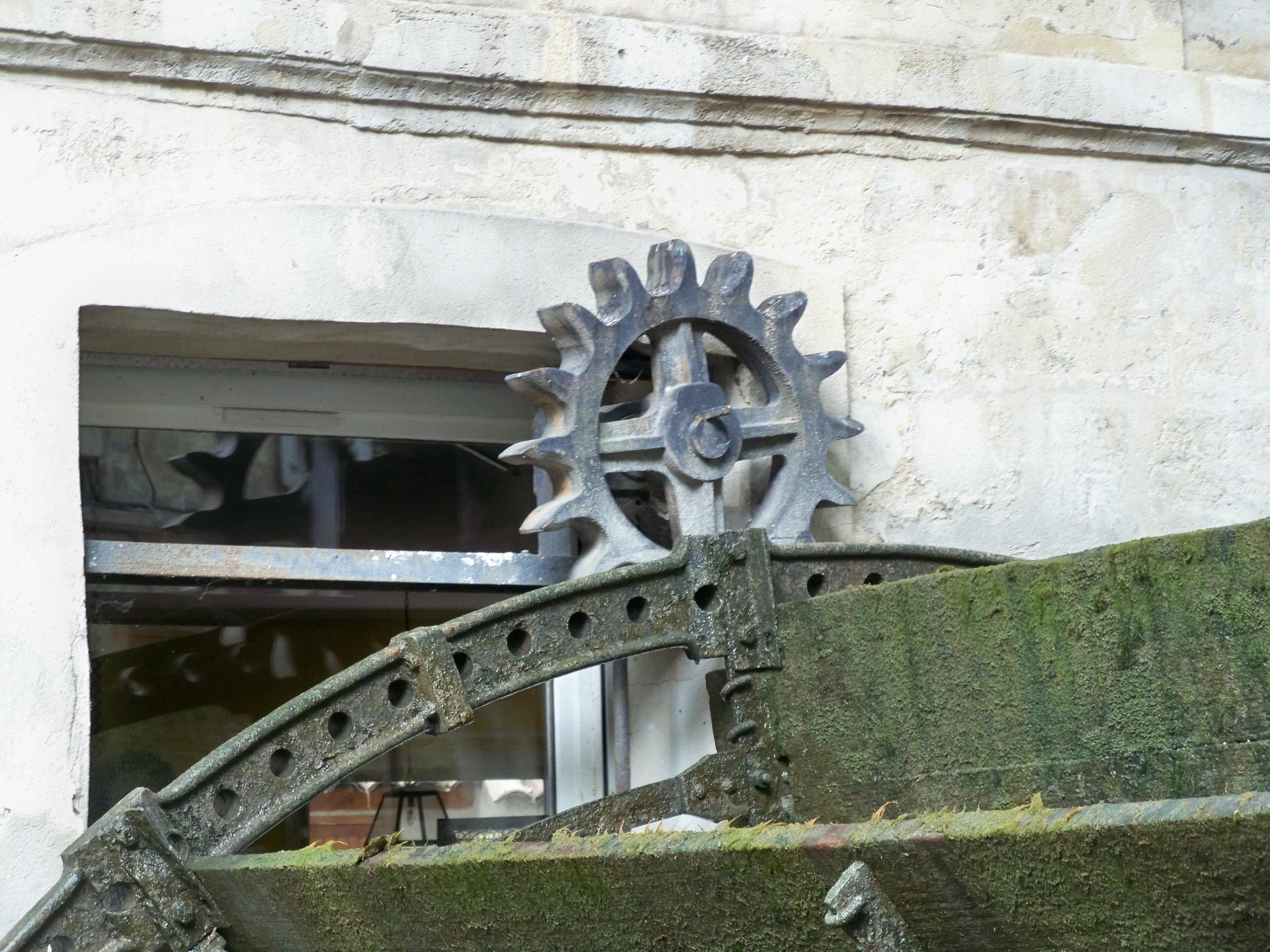 Mécanisme de roues rue des teinturiers d'Avignon, Vaucluse, France